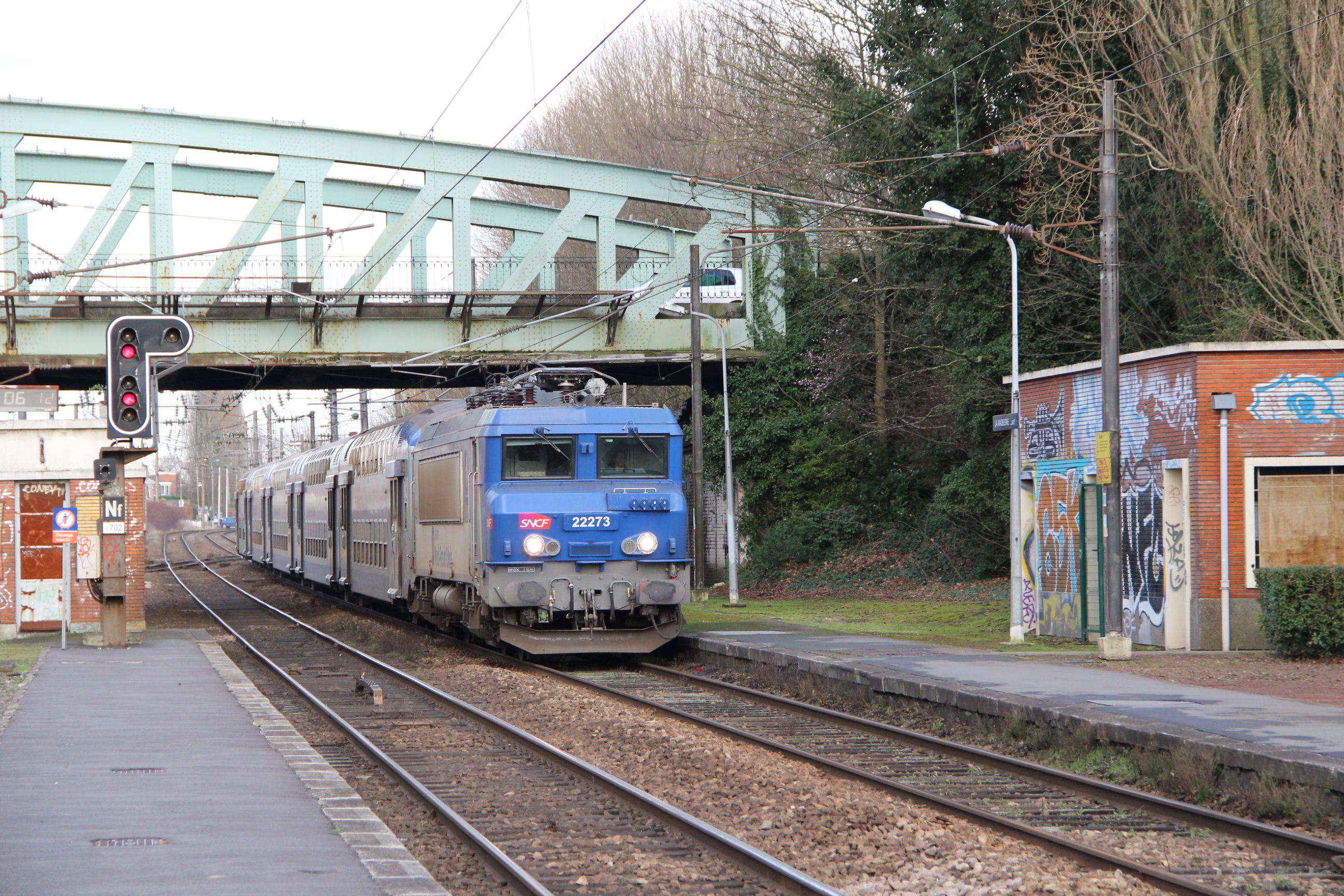 BB 22273 + VR2N